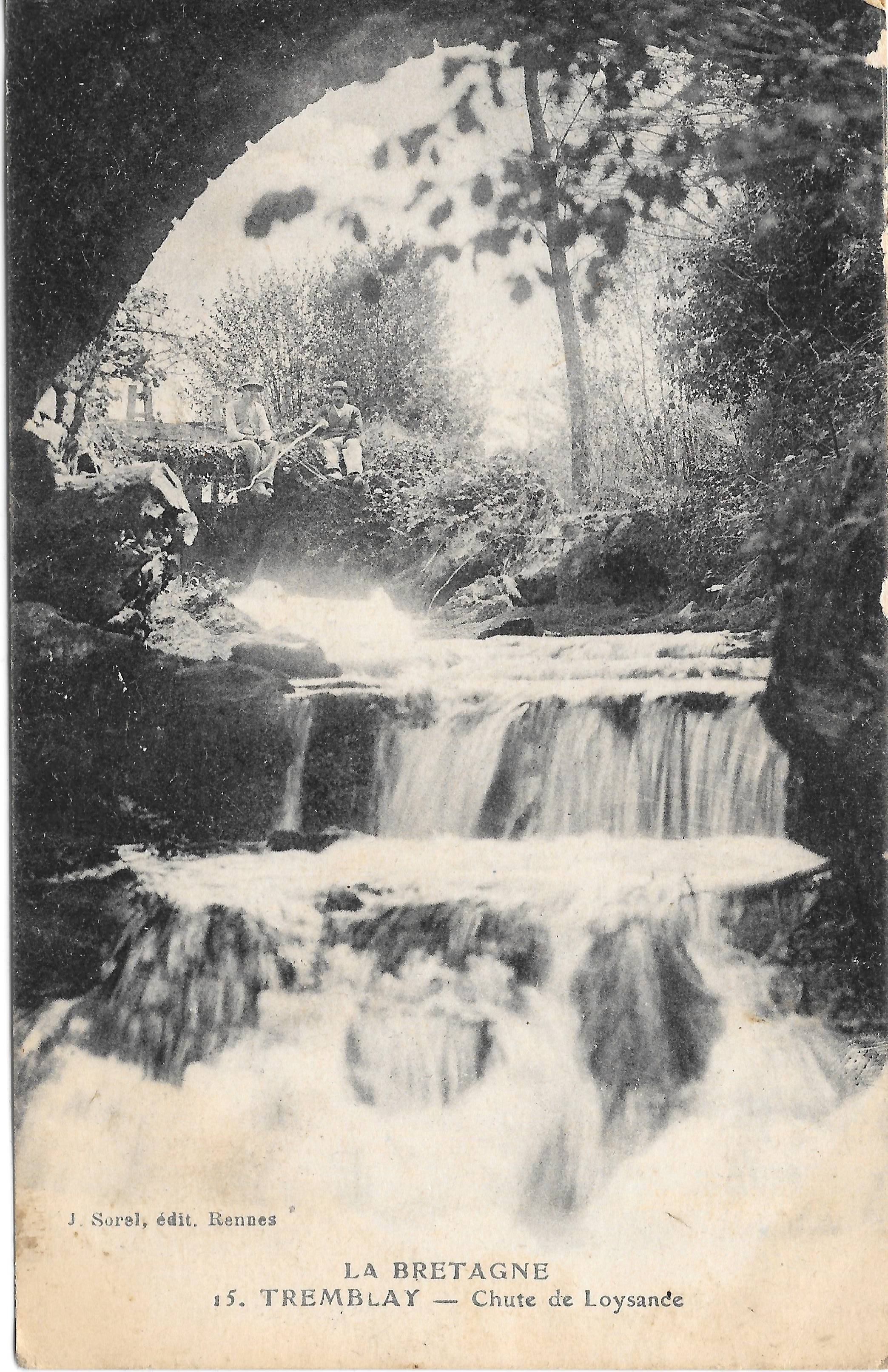 Carte postale